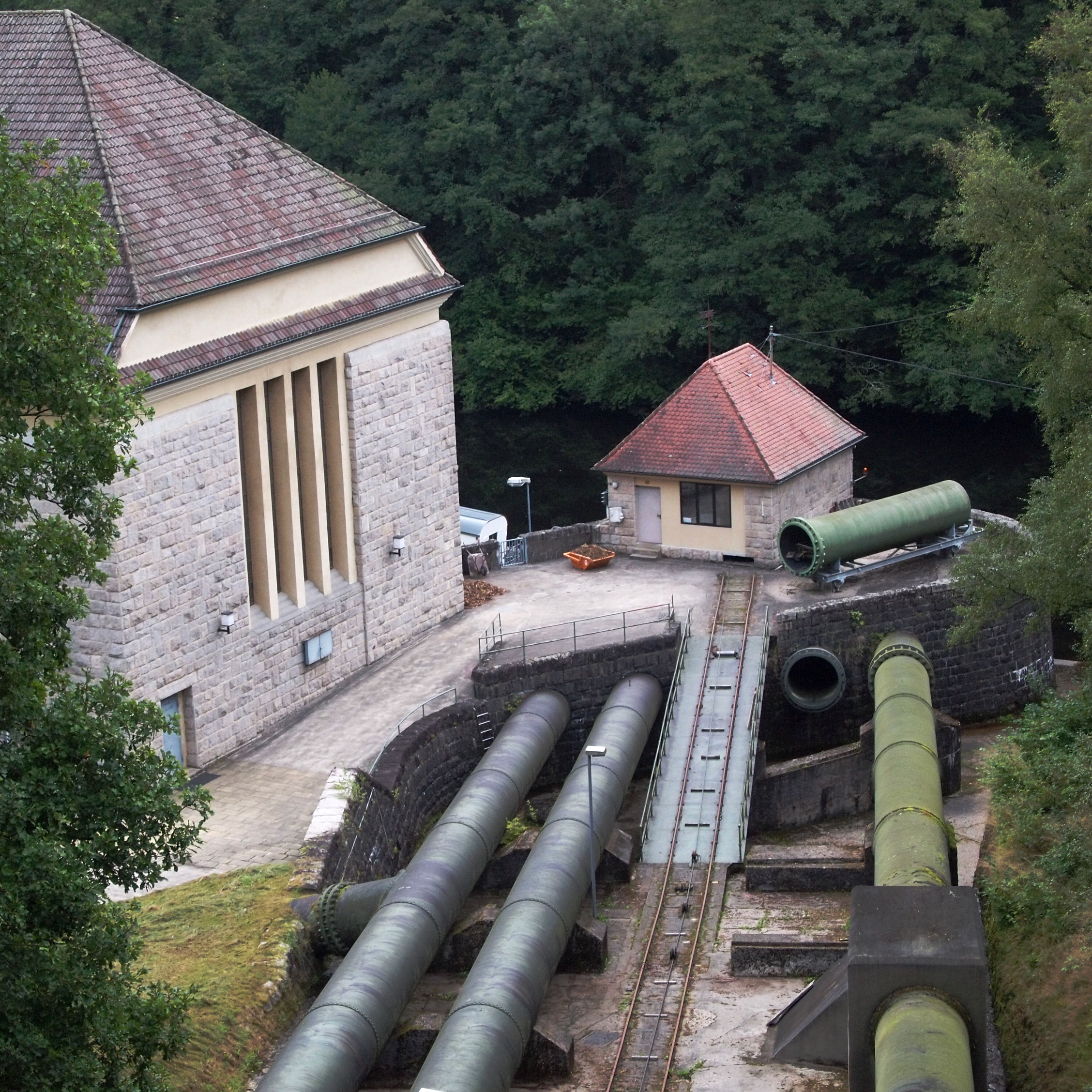 Rudolf-Fettweis-Werk, Druckrohre von den Stauseen und Maschinenhaus. Die linken Rohre kommen von der Murgtalsperre, das rechte von der Schwarzenbachtalsperre.